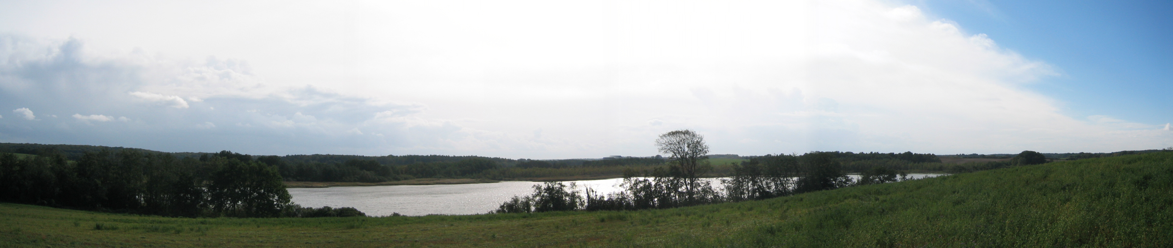 Sabinensee bei Willmine in der Uckermark.